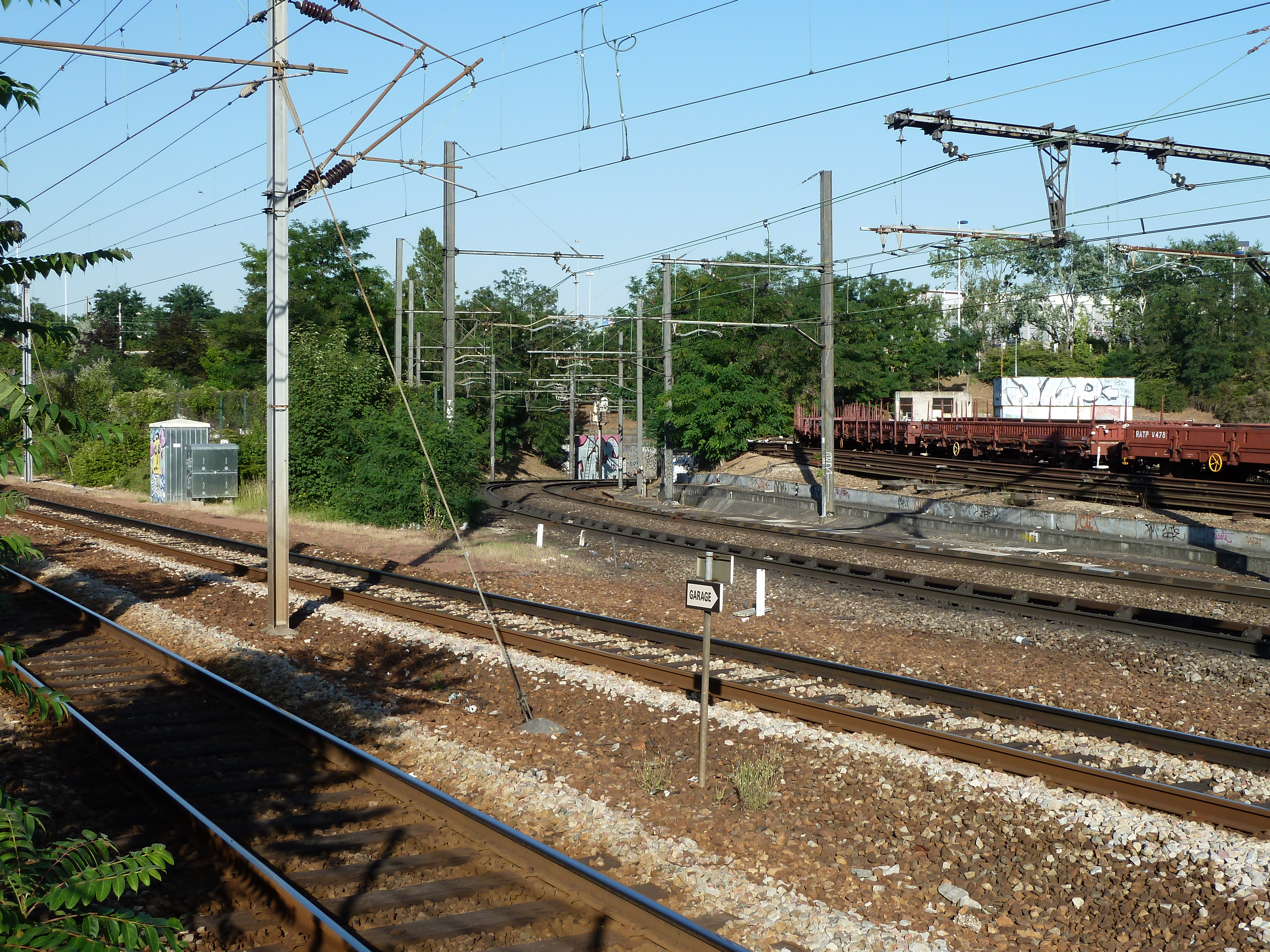 Premier plan: Voies du Transilien L. Milieu: Sortie du tunnel du RER A. Fond droite: Ateliers RATP.